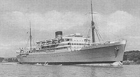 Fotografia do navio HMS Dunvegan Castle (British Armed Merchant Cruiser), que foi afundado na costa da Irlanda em 27 de agosto de 1940, pelo submarino alemão U-46.